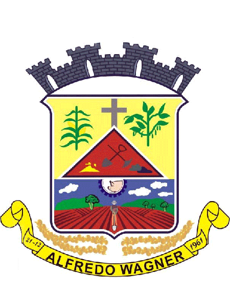 Blason de la municipalité d'Alfredo Wagner - SC - Brésil